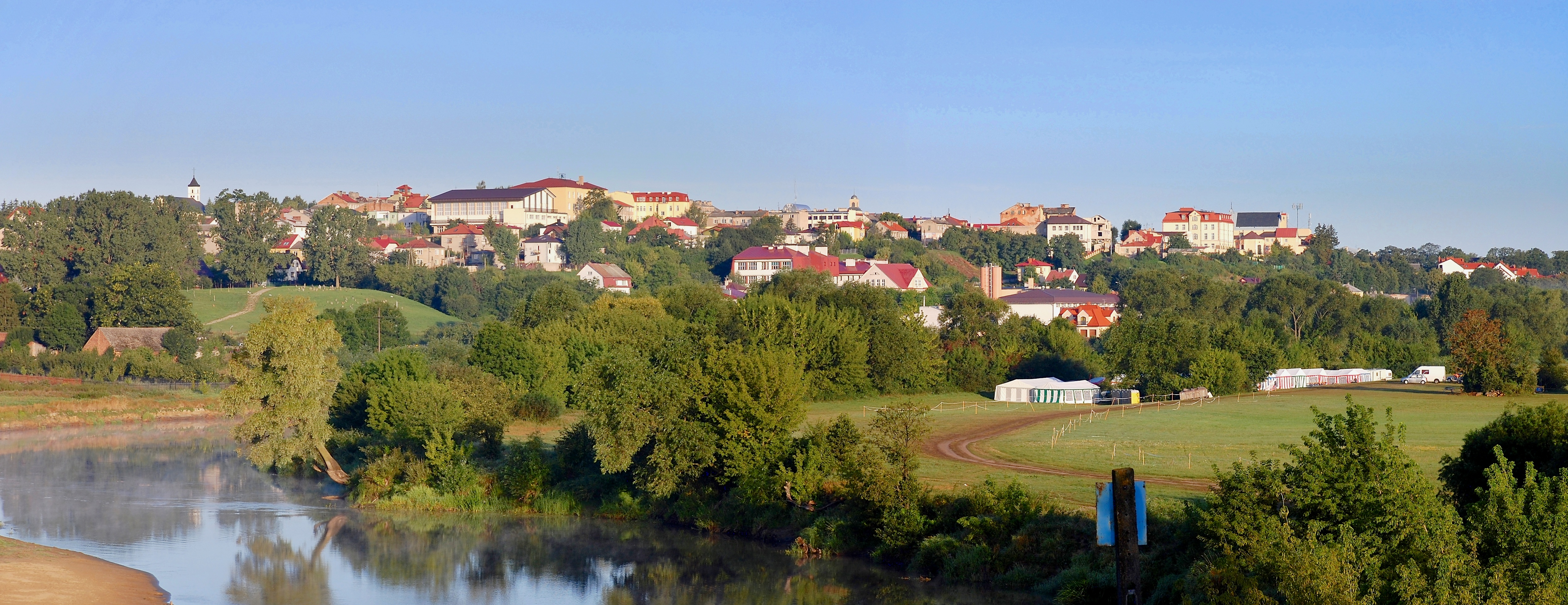 Panorama Łomży od strony południowo-wschodniej